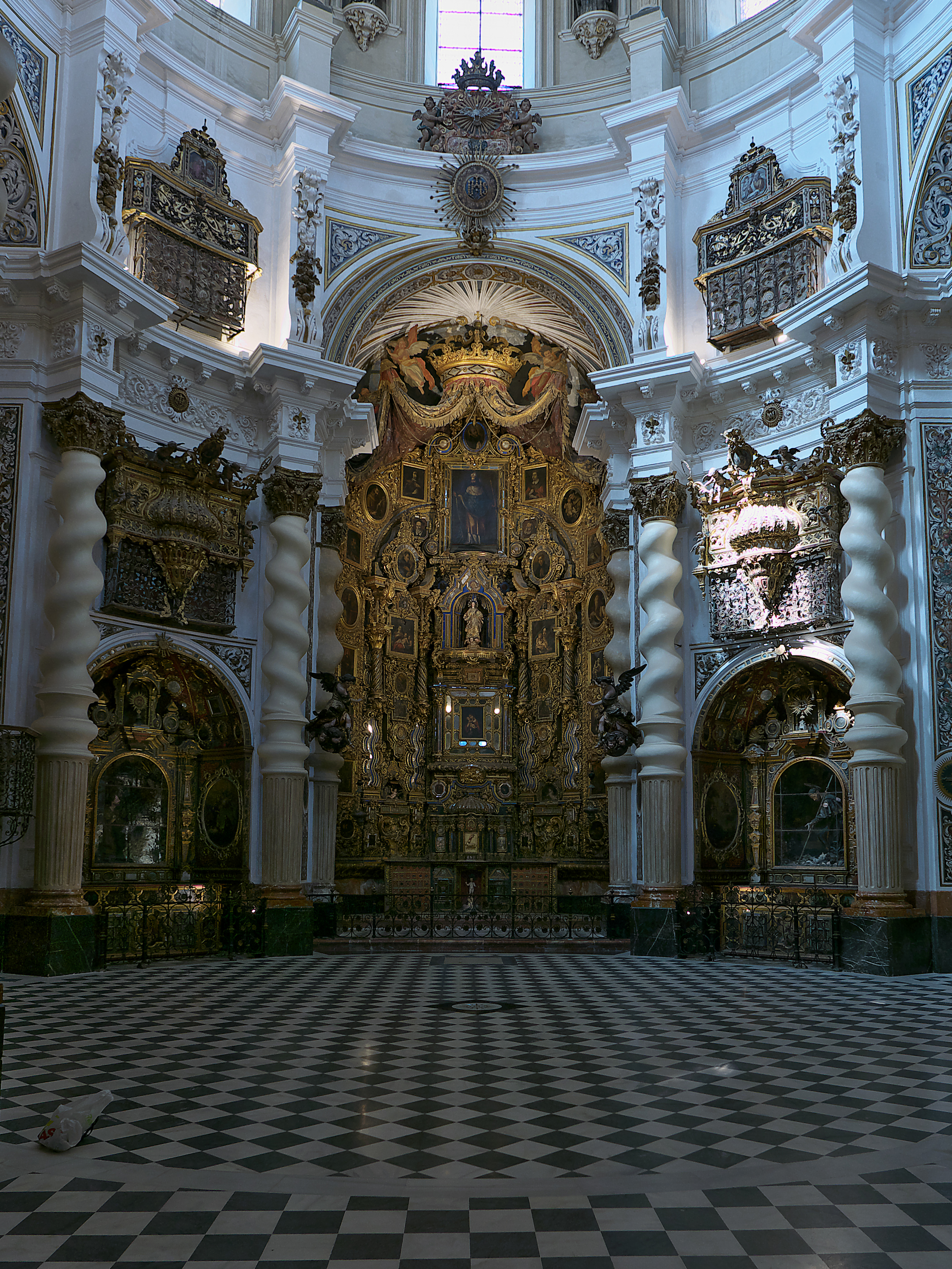 Francisco Lelio Levanto, canónigo de la Catedral de Sevilla, promociona el retablo (1730-1731), al que aporta su colección de esculturas, relicarios, pinturas ... ocasionado una profusa iconografía. La Iglesia de San Luis es consagrada el 25 de enero de 1733.